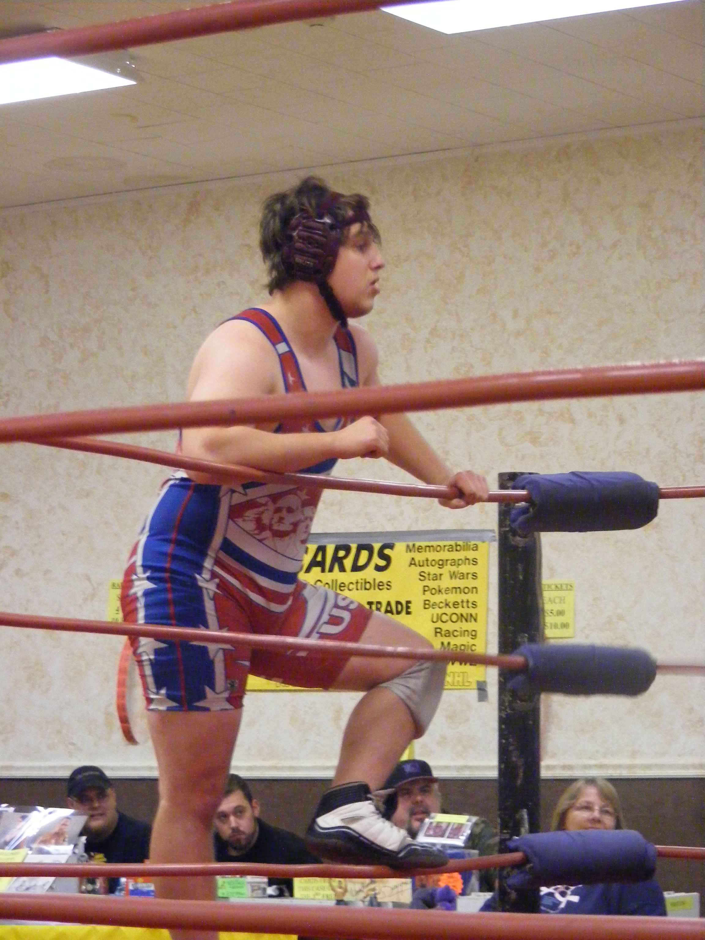 Tim Donst at a Chikara Event